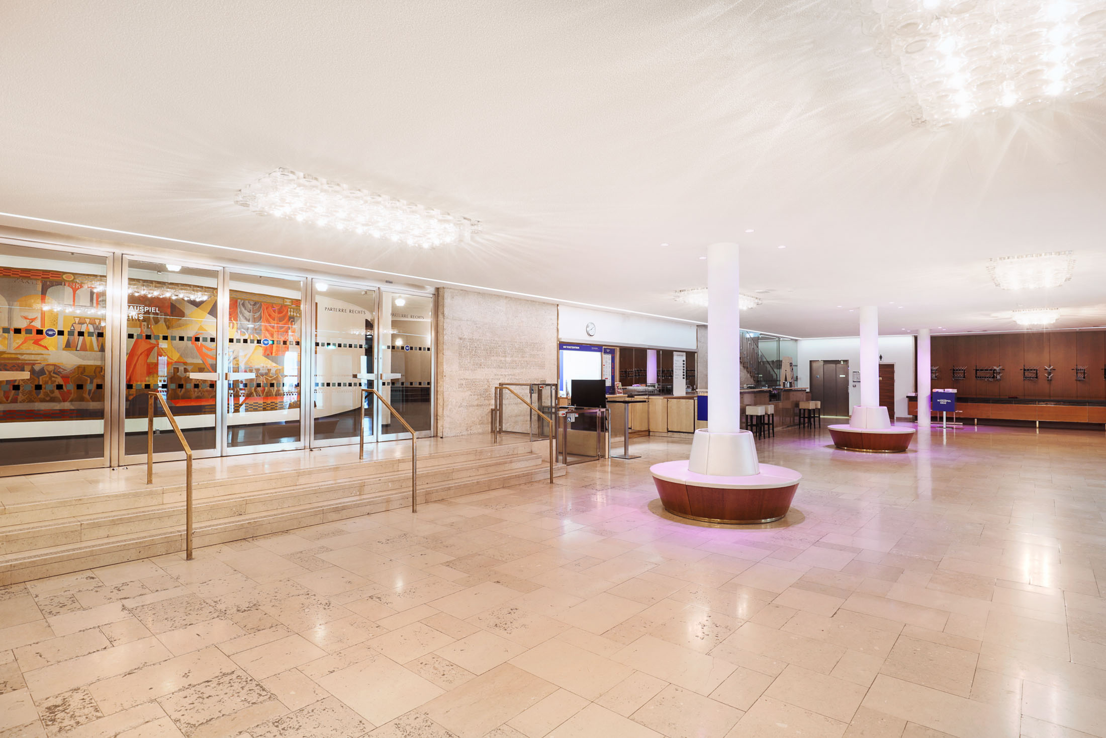 Schauspielhaus Graz - Foyer